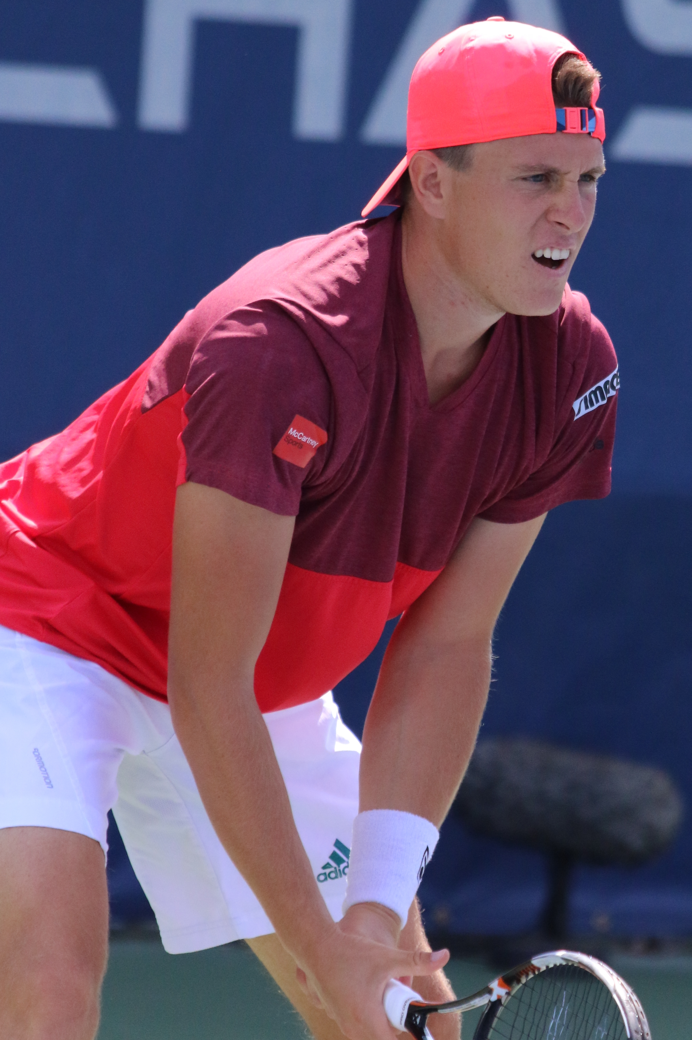 Weissborn US16 (12)